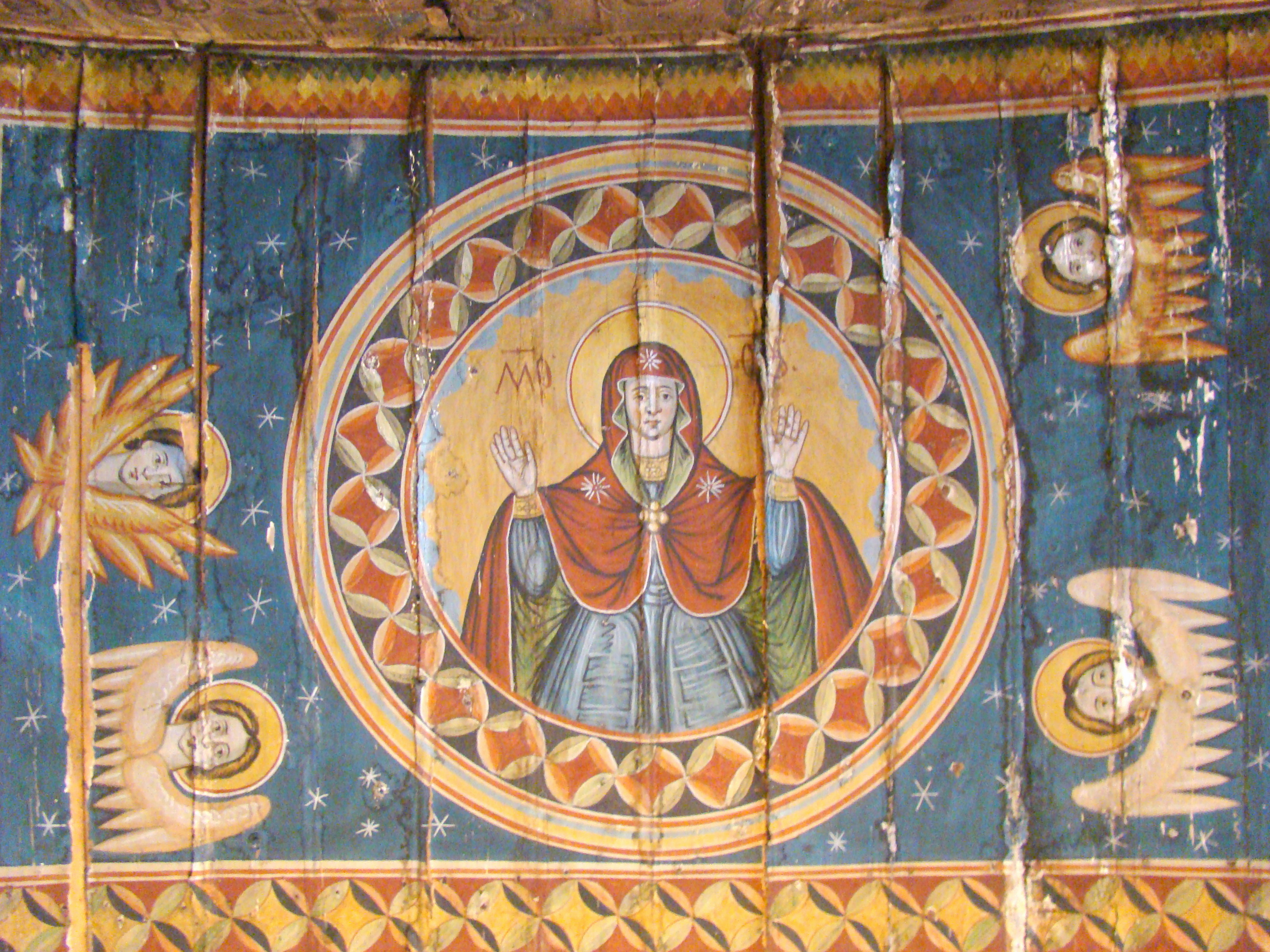 Biserica de lemn din Roșia Nouă, județul Arad